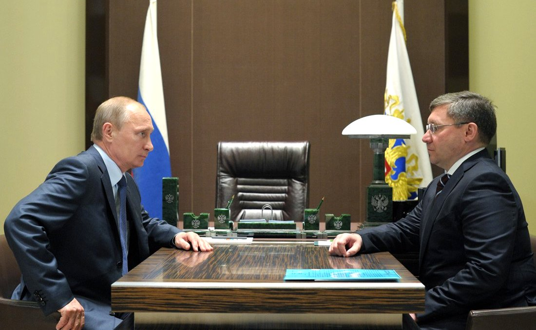 Встреча Президента России Владимира Путина с губернатором Тюменской области Владимиром Якушевым